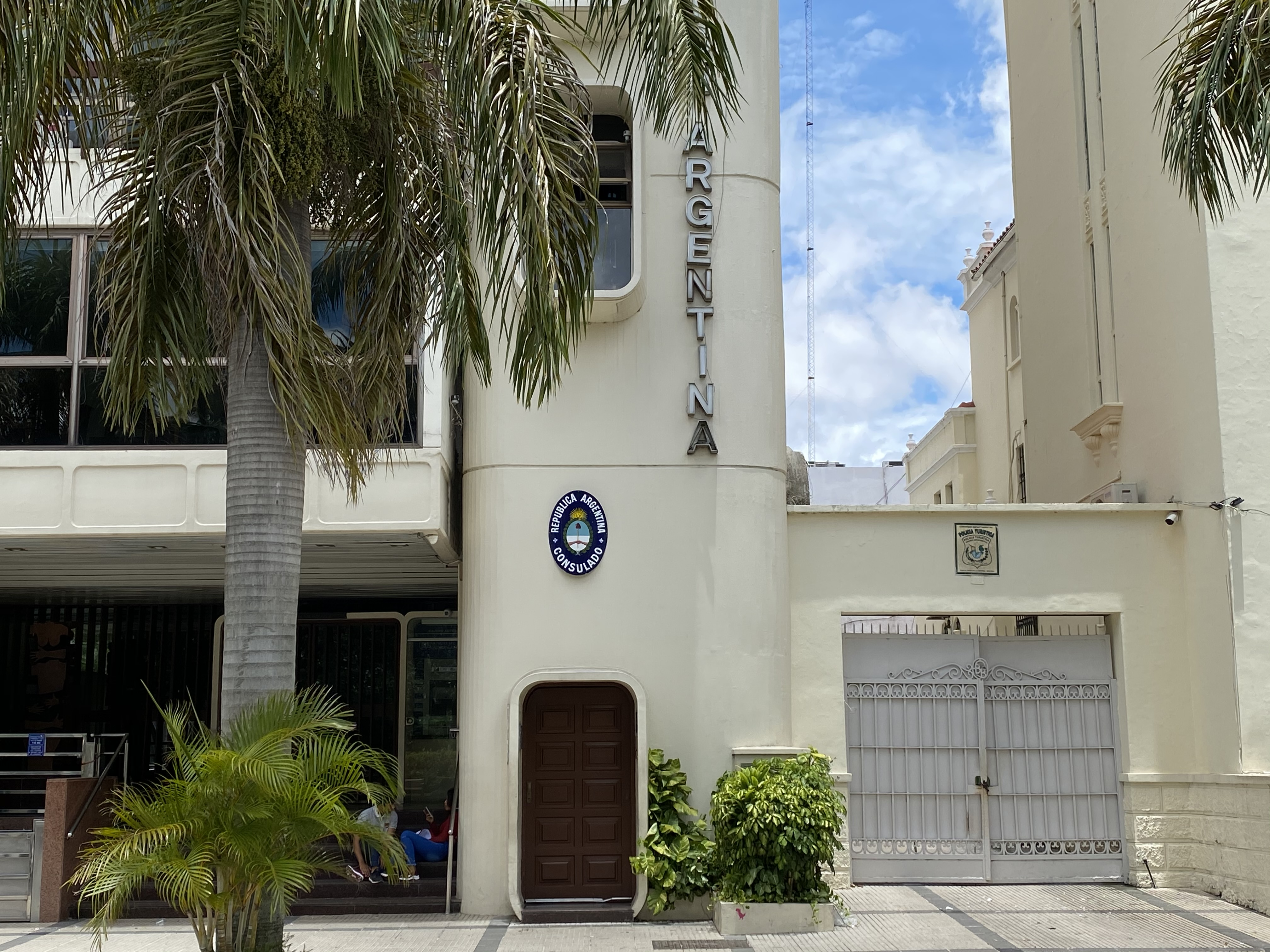 Consulado de la República Argentina en Santa Cruz de la Sierra, Bolivia